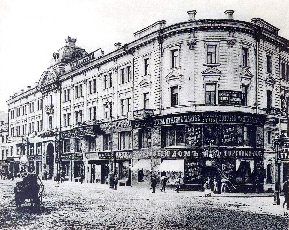 Тверская улица. Пассаж Постниковой.